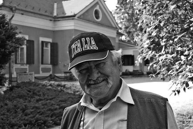 Petrovics Emil (Nagybecskerek, 1930. február 9. – Budapest, 2011. június 30.) kétszeres Kossuth-díjas és kétszeres Erkel Ferenc-díjas magyar zeneszerző, érdemes és kiváló művész.